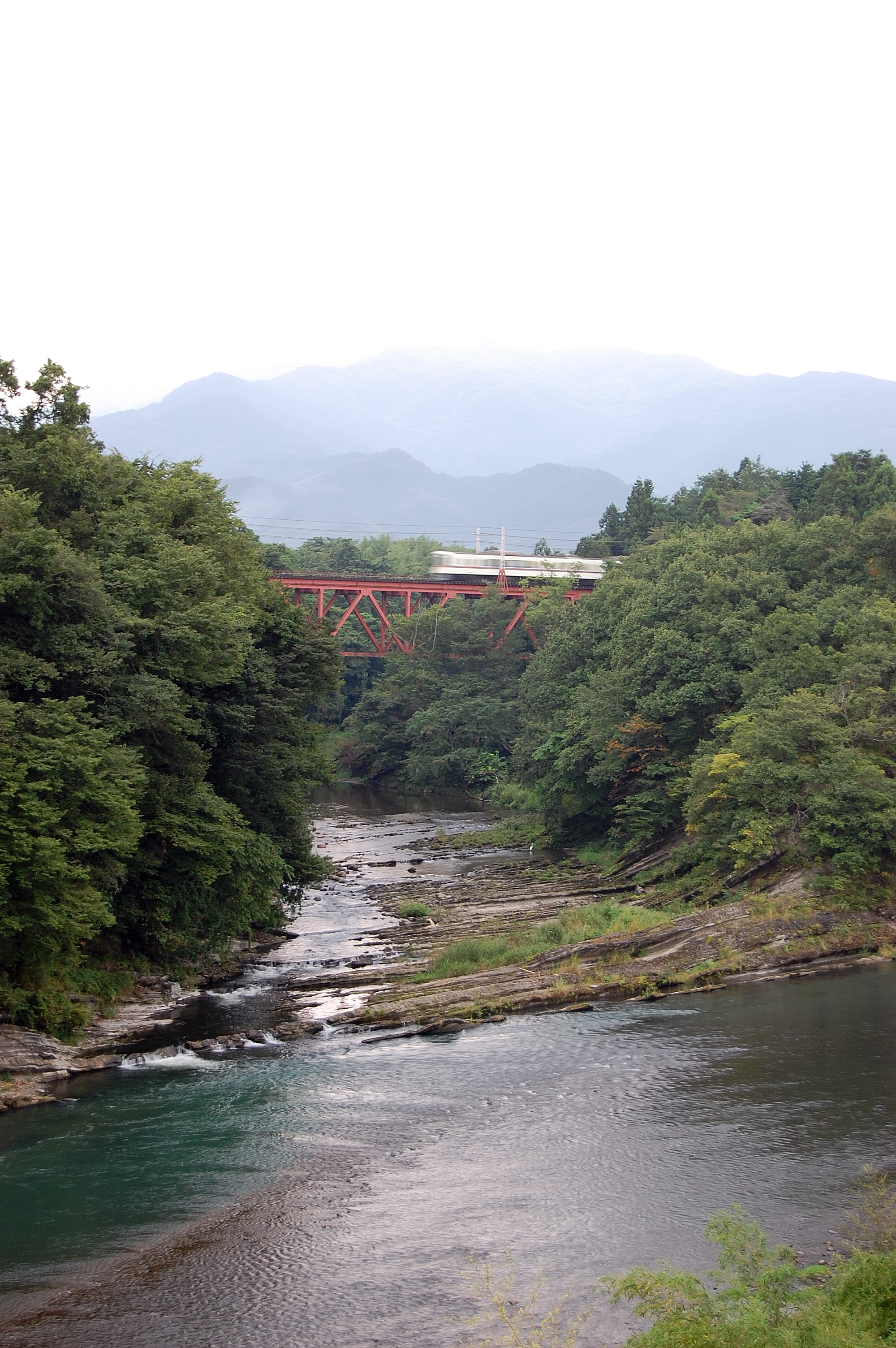 横瀬川 〔奥〕 と荒川 〔手前〕 の合流点。秩父市寺尾の和銅大橋より撮影。地図はこちら。